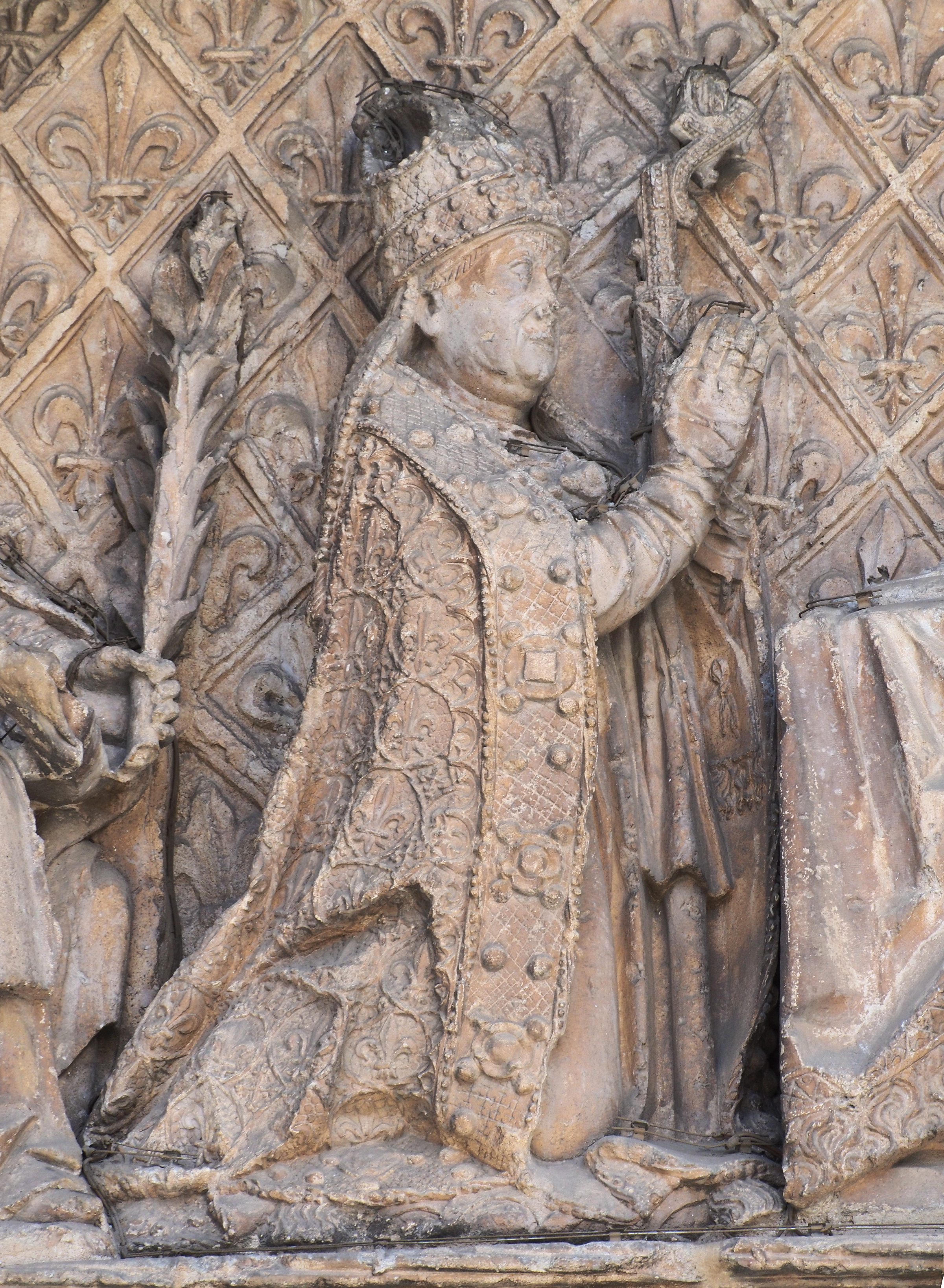 Ofrenda del obispo Alonso de Burgos, fundador del colegio, a San Gregorio Magno. Tímpano del pórtico del Colegio de San Gregorio, Valladolid.